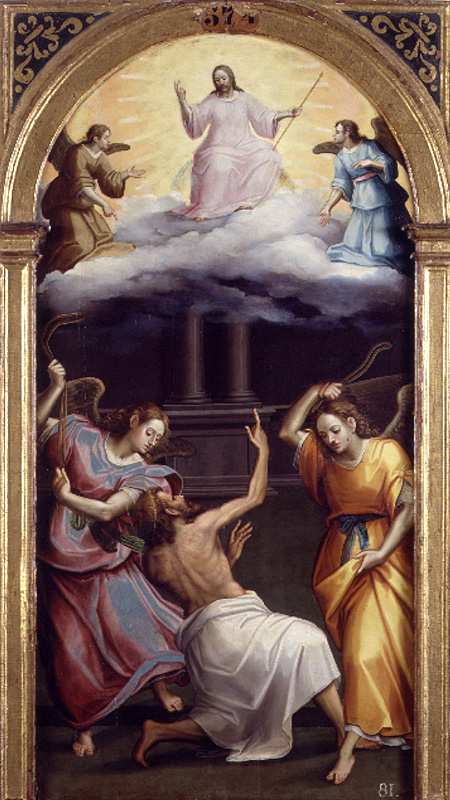 La obra representa a San Jerónimo de Estridón, uno de los Padres de la Iglesia, siendo azotado por los ángeles de Dios.